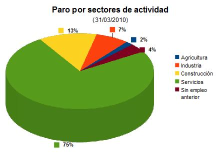 Paro por sectores de actividad en Toledo (España)